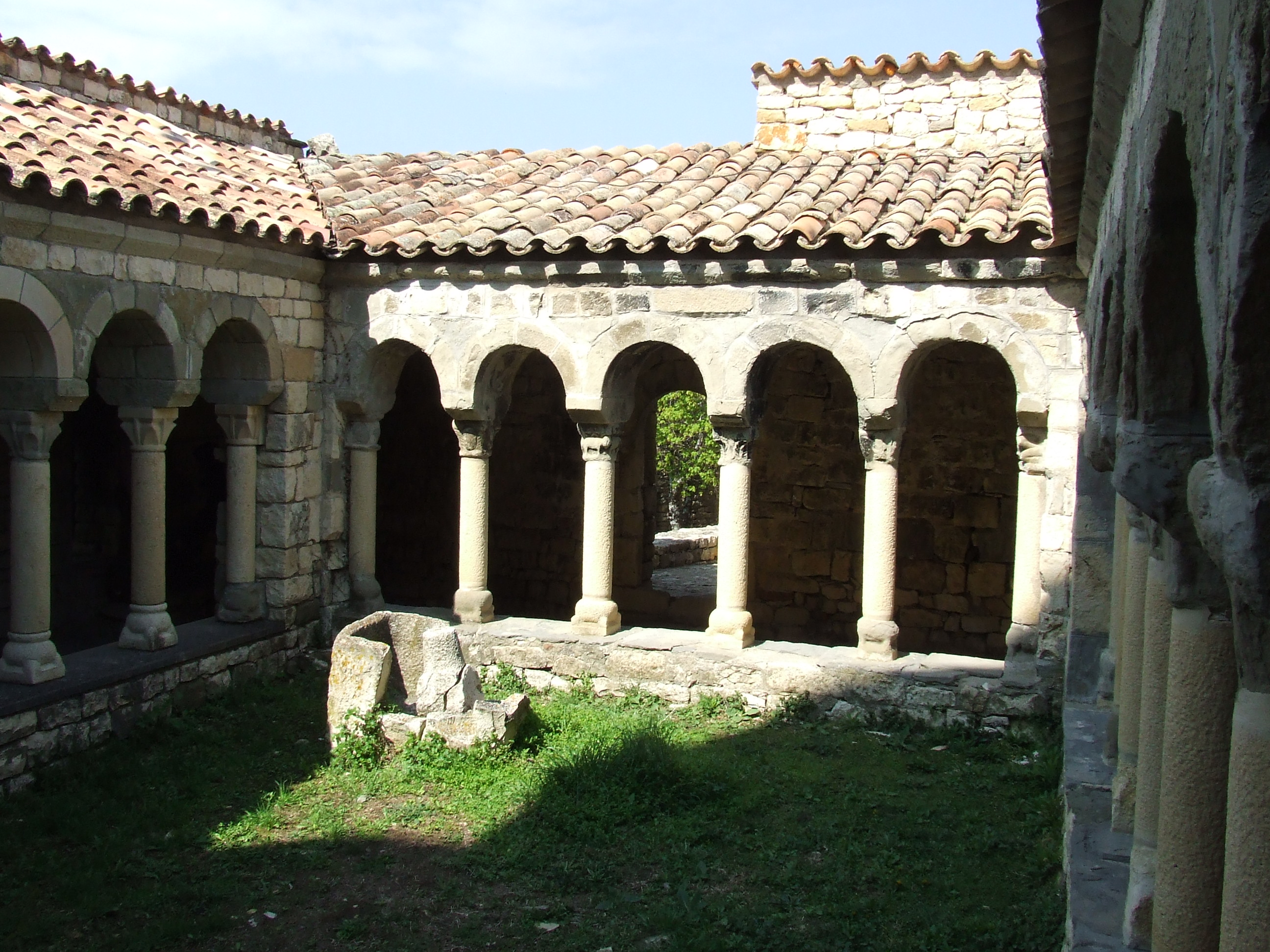 Claustre de Santa Maria de Mur (Mur, Castell de Mur, Pallars Jussà)